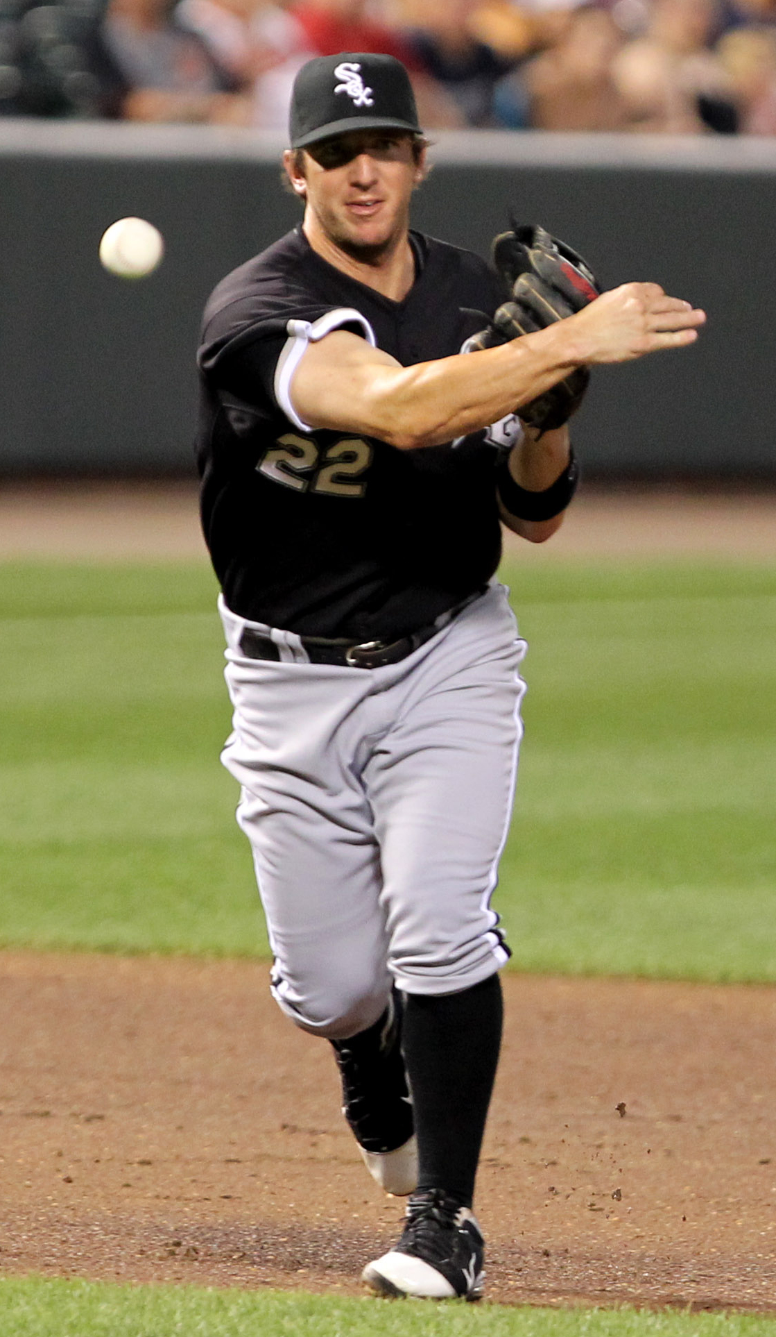 Brent Morel